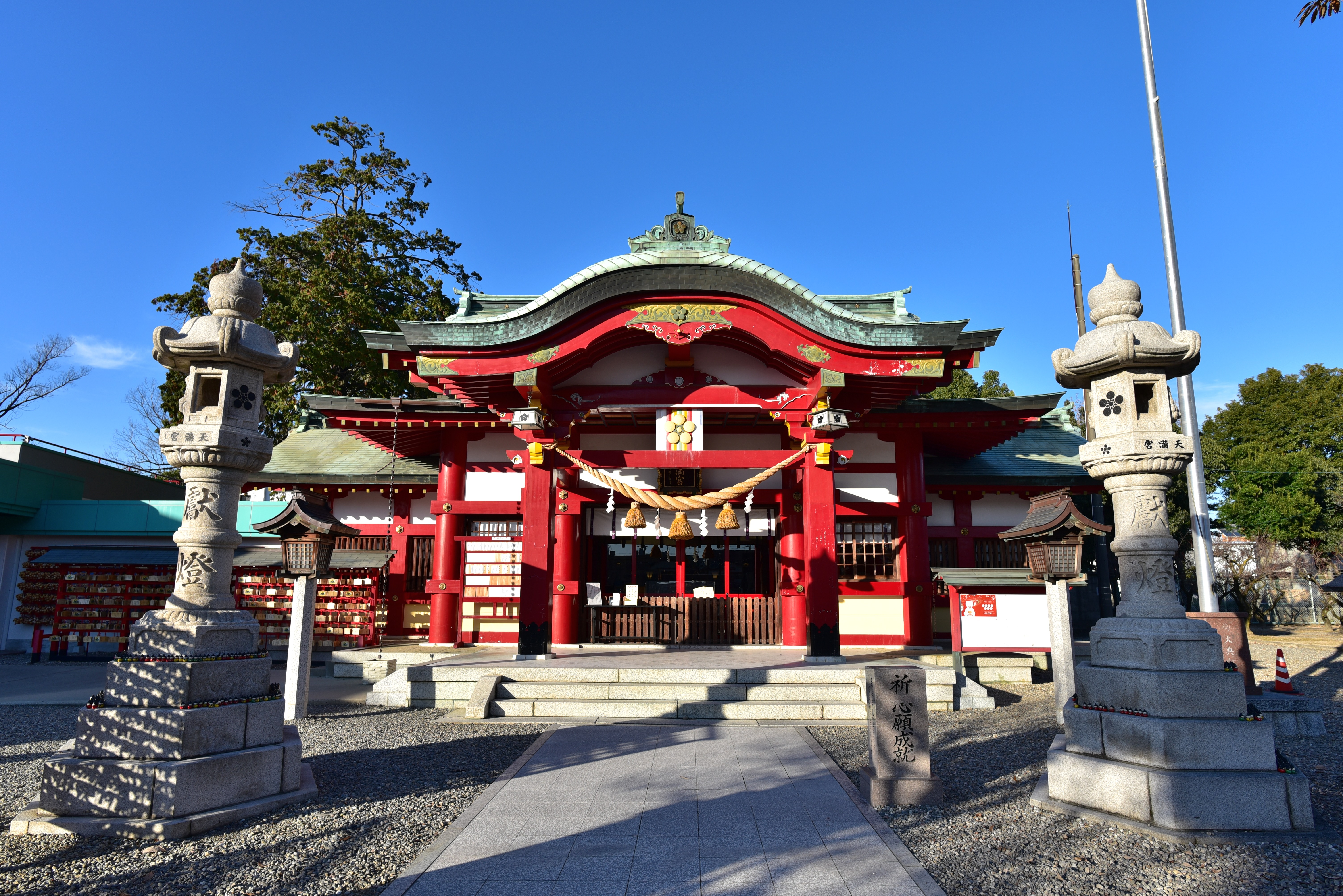 上野天満宮拝殿